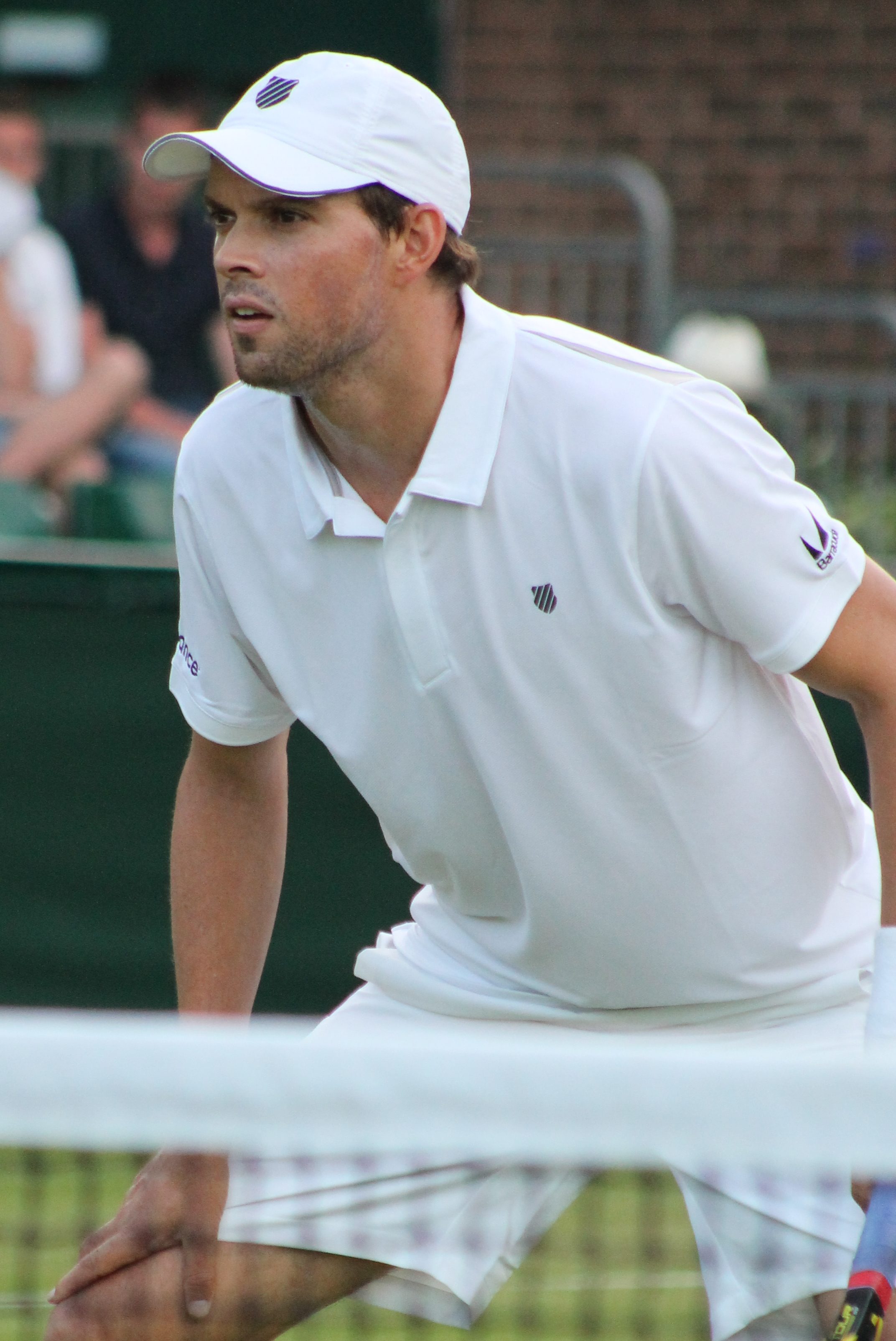 Bryan B. WM15 (2)